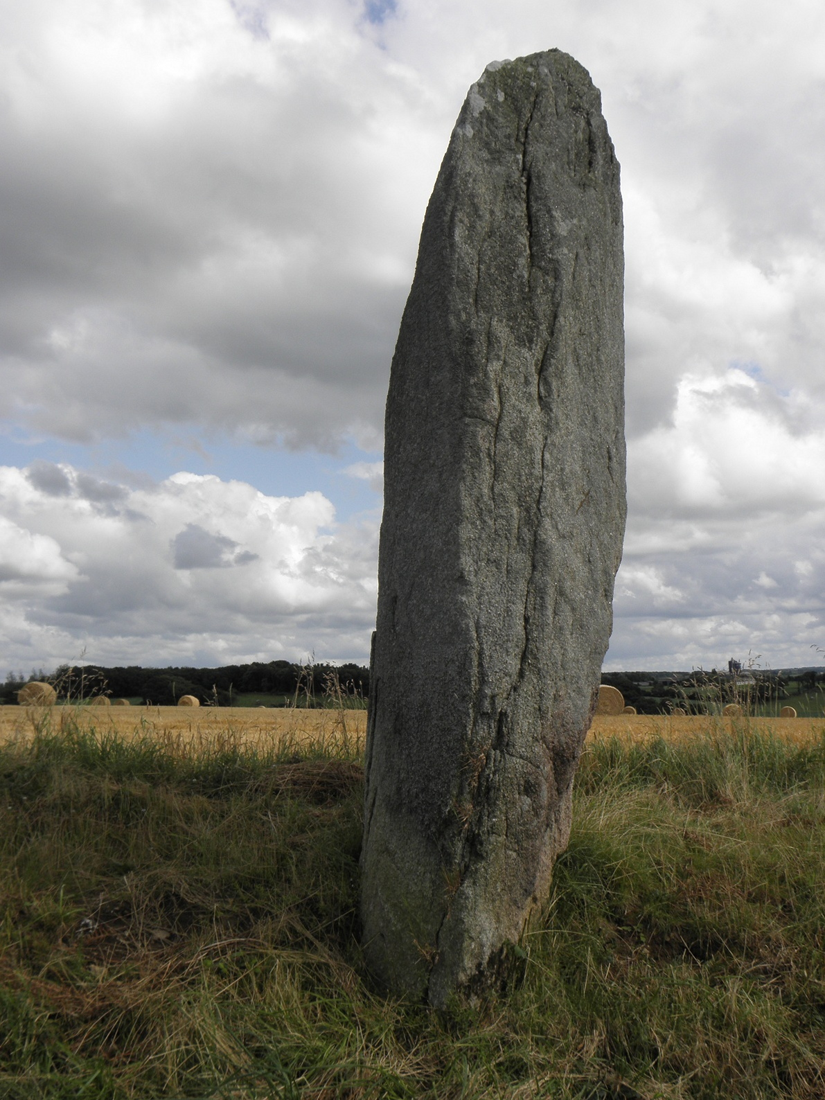 Menhir de Créac'h Edern en Plouigneau (29).